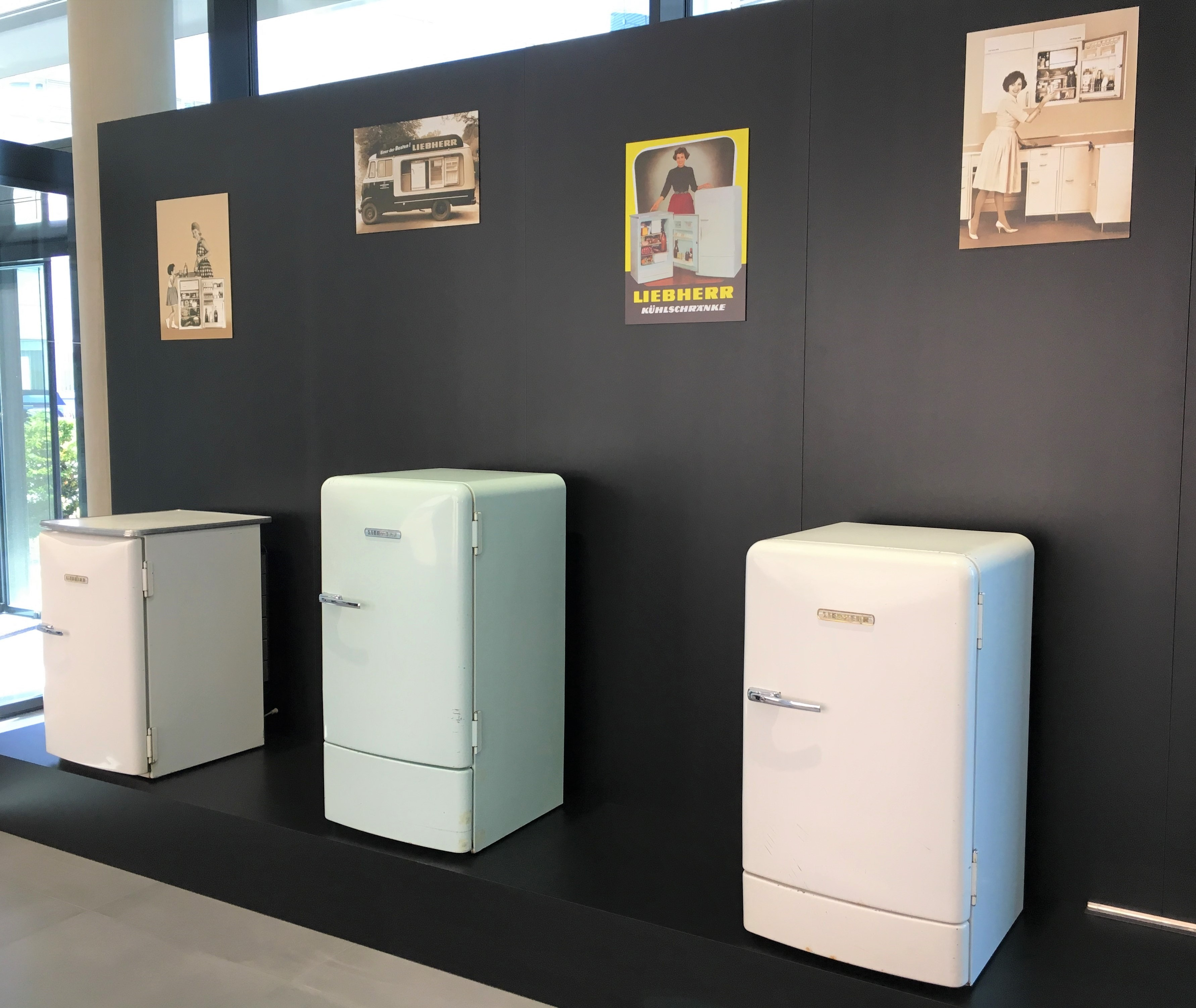 Empfangshalle im Liebherr Werk Ochsenhausen